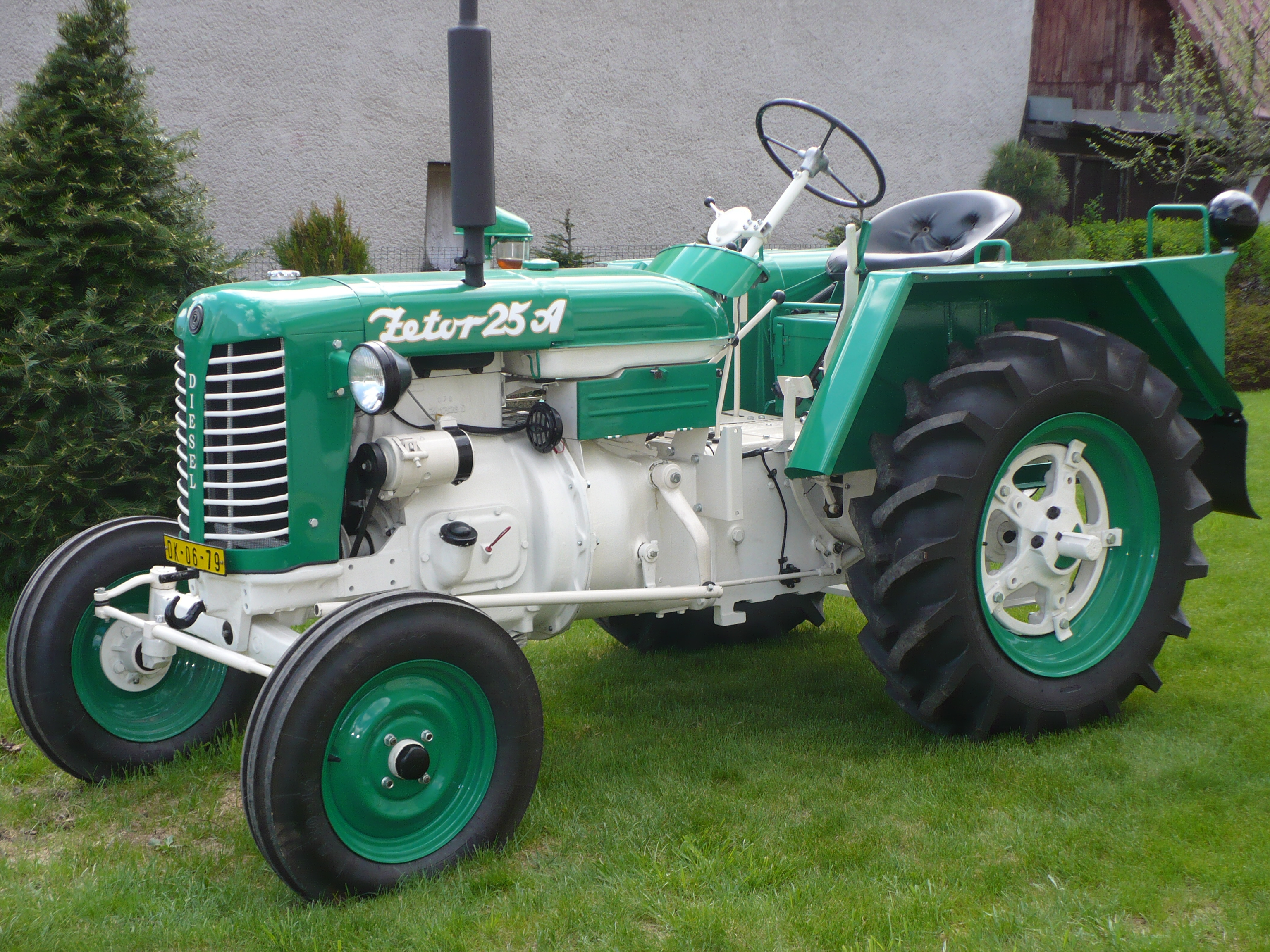 Traktor